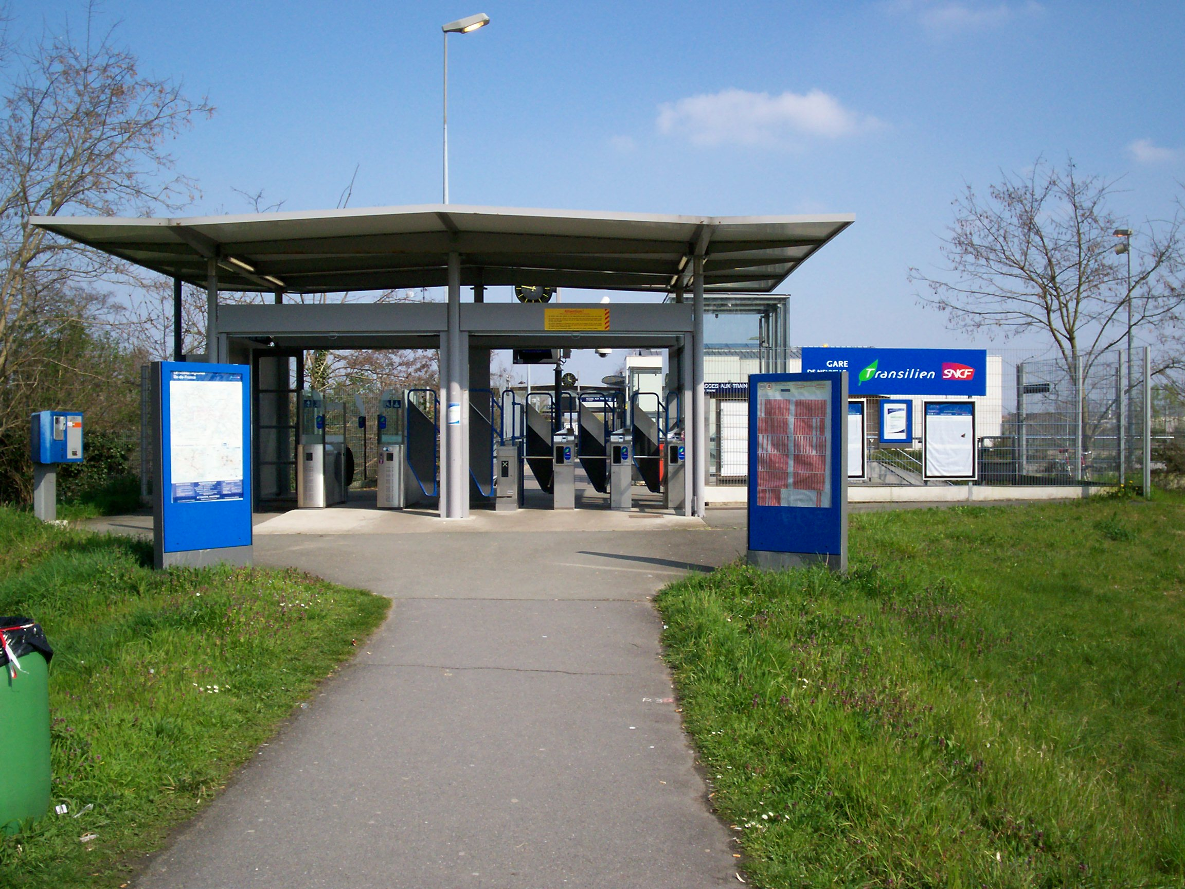 Gare de Neuville Université